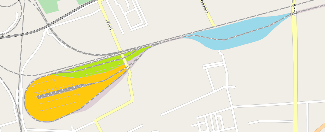 北京动车段布置。蓝色：第一存车场；绿色：第二存车场。黄色：检修场。由OpenStreetMap导出地图修改获得